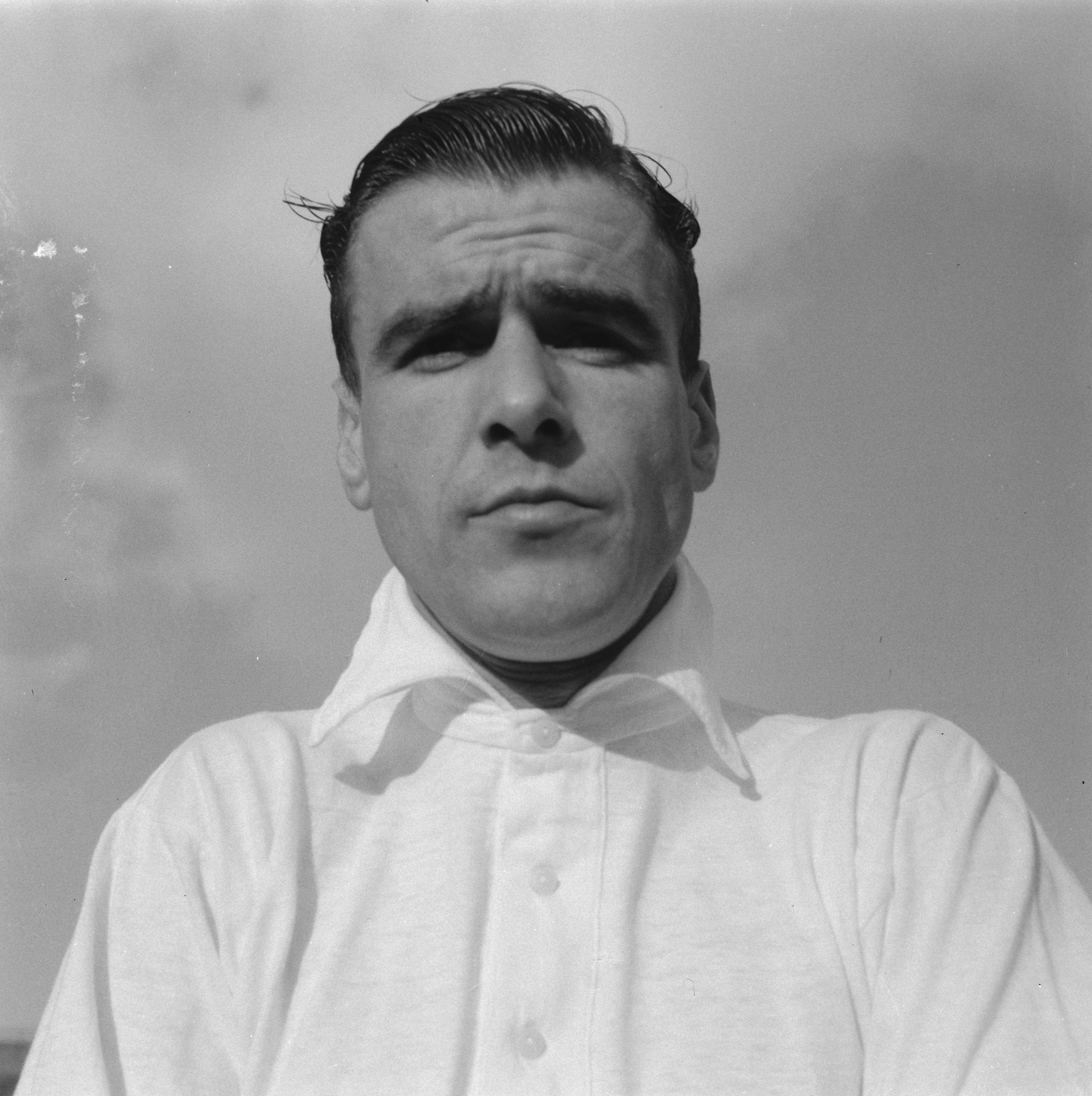 Collectie / Archief : Fotocollectie Anefo Reportage / Serie : [ onbekend ] Beschrijving : Voetballers voor archief, Dillen Datum : 16 februari 1955 Trefwoorden : portretten, sport, voetballers Persoonsnaam : Dillen, Coen Fotograaf : Noske, J.D. / Anefo Auteursrechthebbende : Nationaal Archief Materiaalsoort : Negatief (zwart/wit) Nummer archiefinventaris : bekijk toegang 2.24.01.03 Bestanddeelnummer : 906-9835